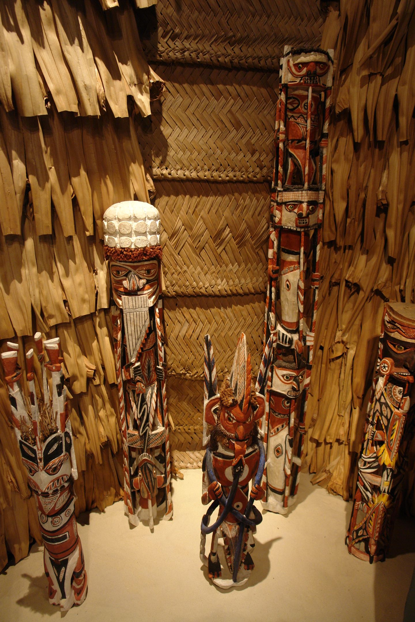 Malanggan Schnitzwerke aus Holz der Astonia scholaris für Totenerinnerungsfeste auf der Insel Neuirland vor der Nordostküste von Neuguinea im Museum der Uni Tübingen (MUT)